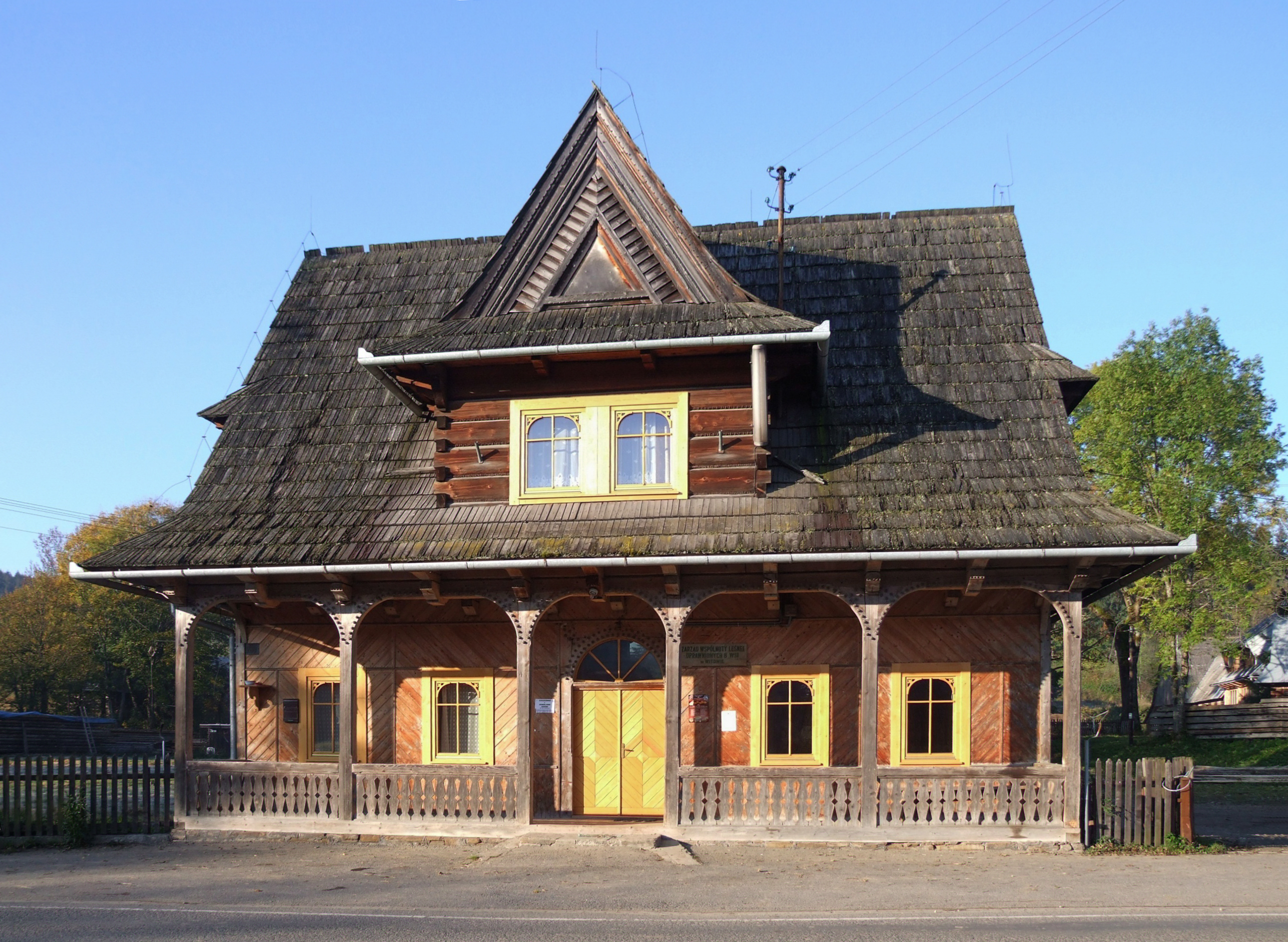 Dom Wspólnoty Uprawnionej 8 Wsi w Witowie